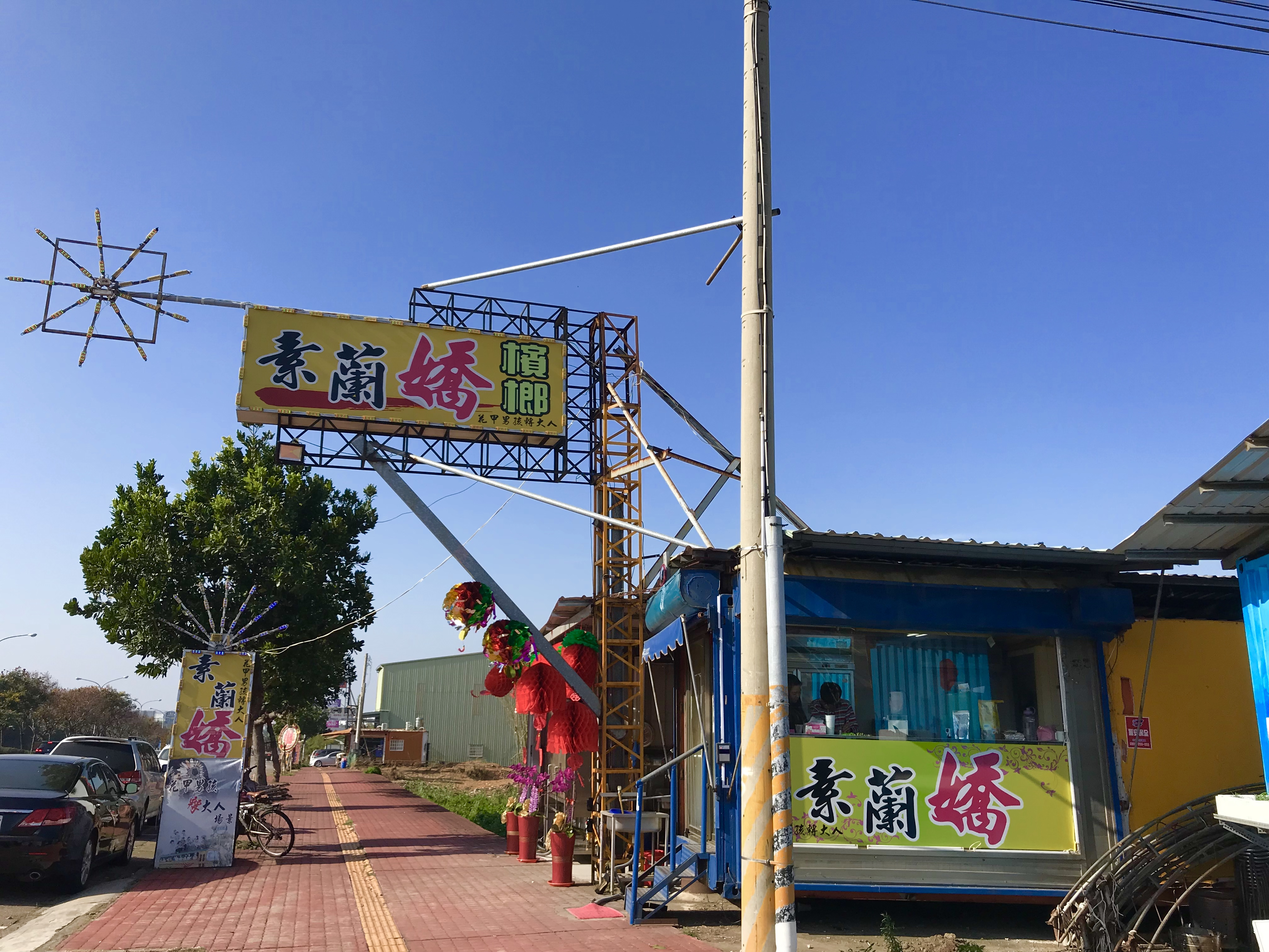 花甲男孩轉大人場景之一台中沙鹿素蘭嬌檳榔攤